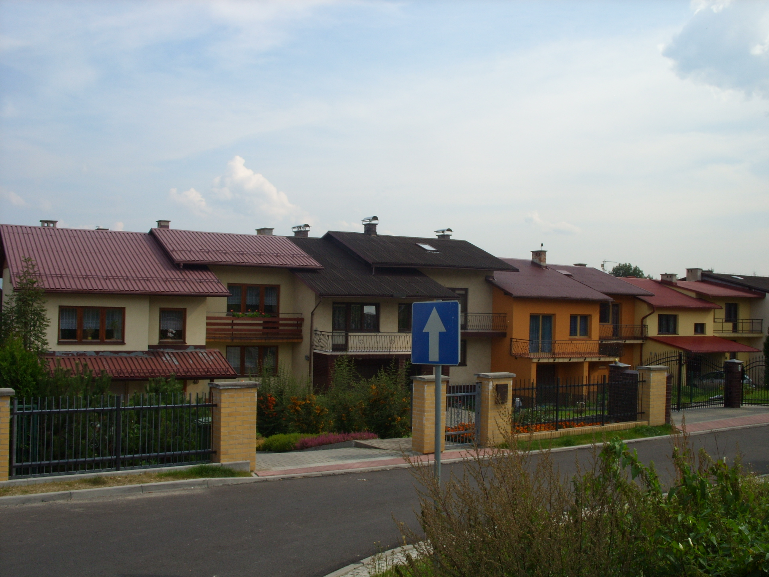 Osiedle Widok w Żywcu